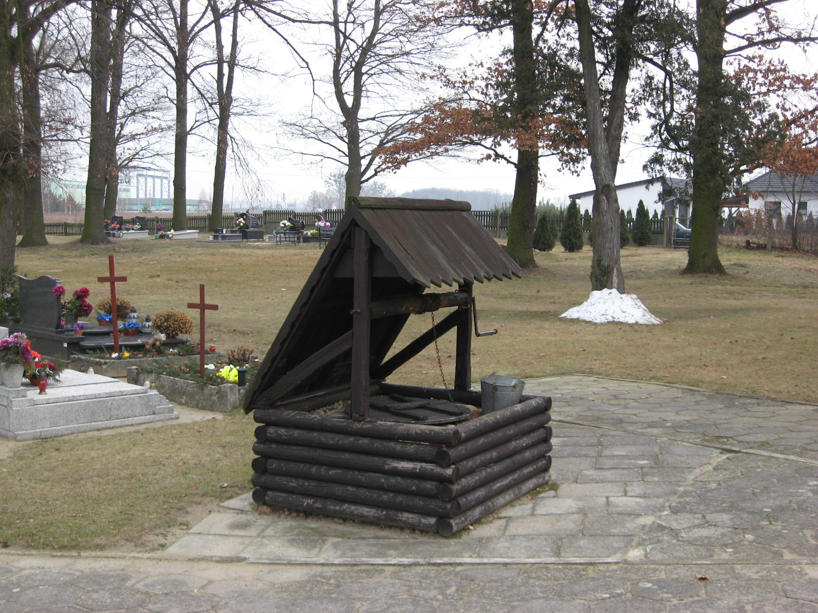 Kościół Podwyższenia Krzyża Świętego w Ligocie Górnej